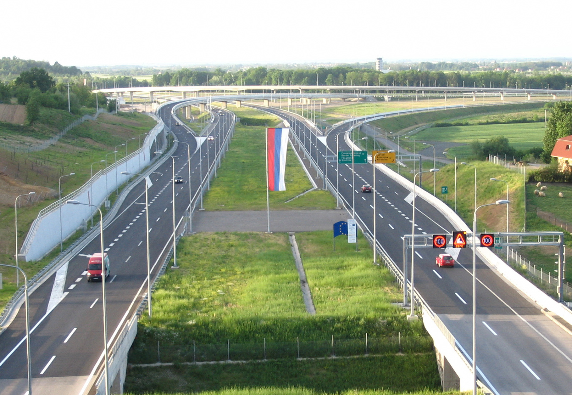 Маховљанска петља